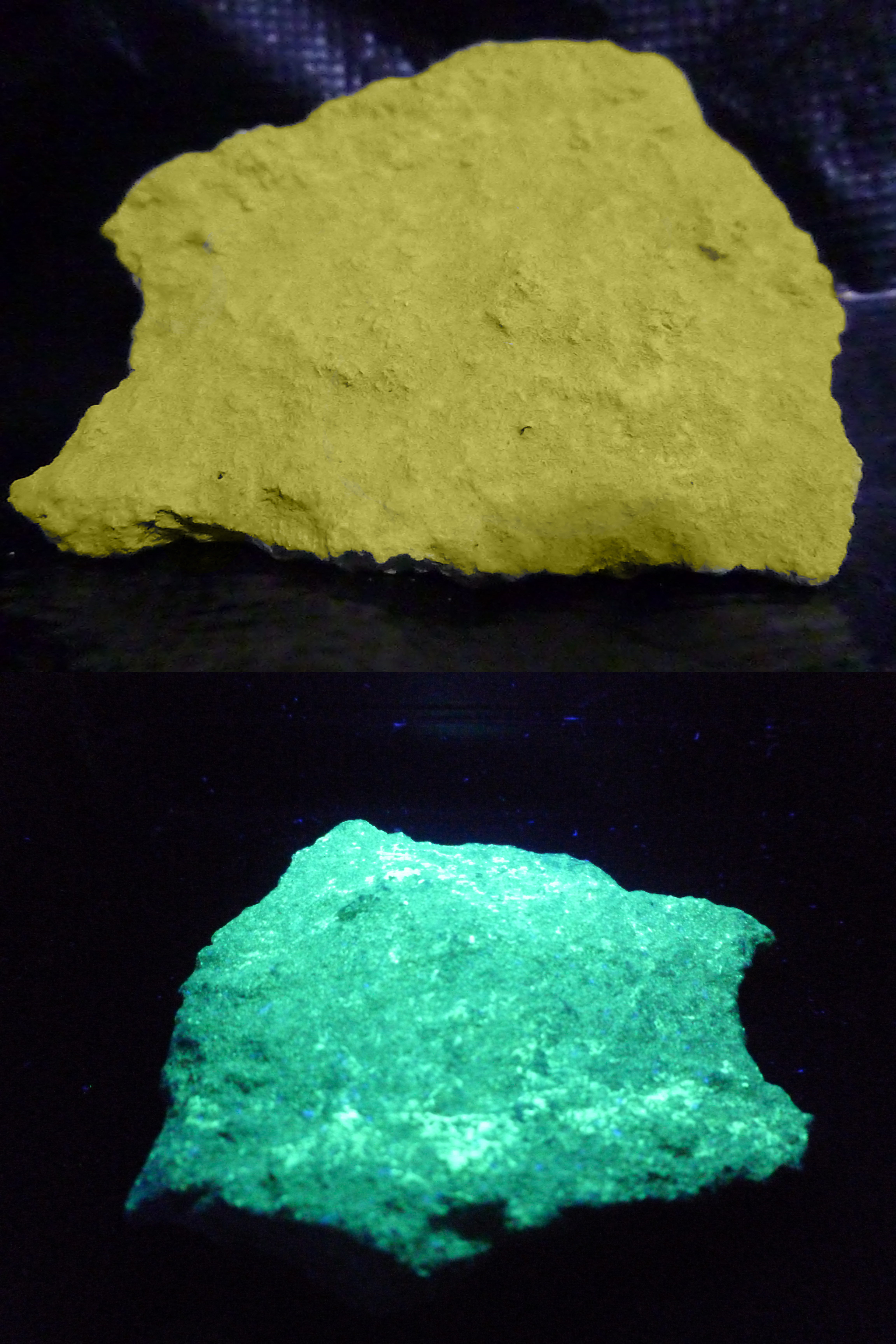 Arriba: Carnotita bajo luz normal Abajo: Carnotita bajo luz UV Se puede apreciar la luminiscencia del Mineral.